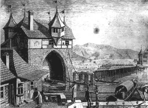 Grendeltor Nordostseite, Kupferstich von Hans Jakob Kull, um 1820